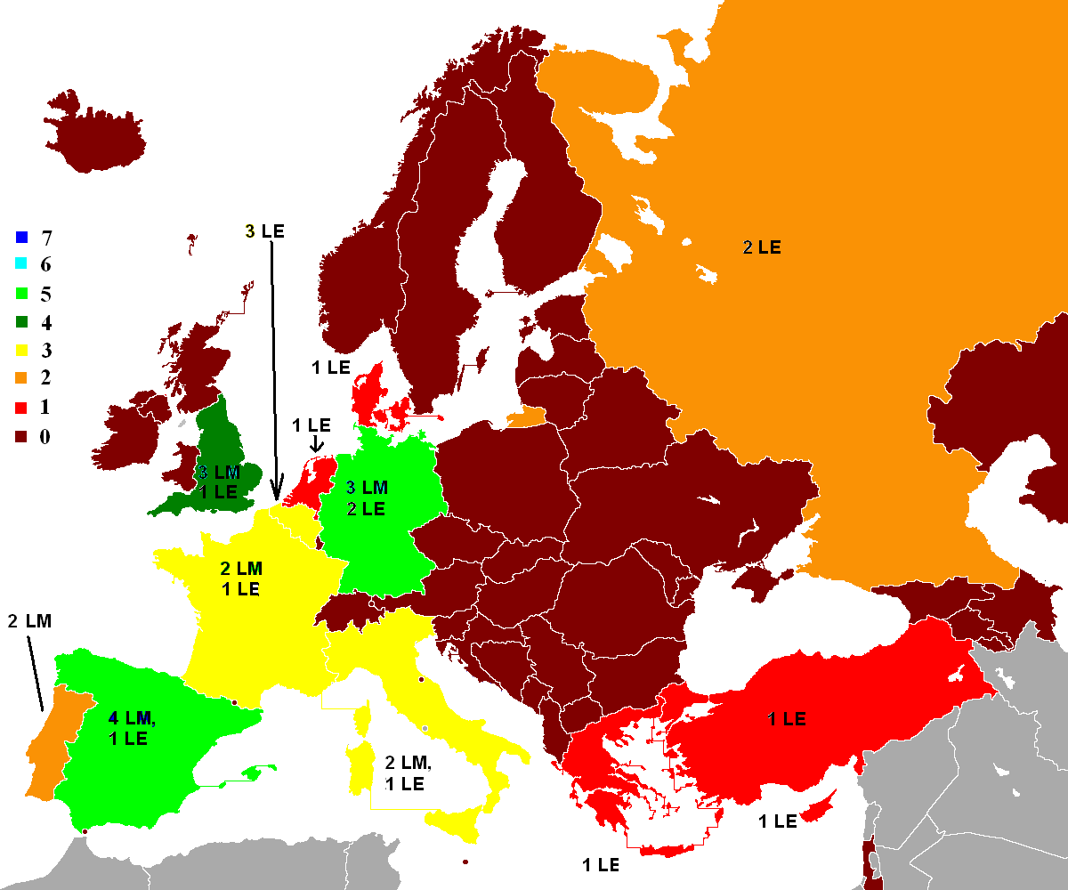 Graficzna ilustracja ilości drużyn, reprezentujących dany kraj w rozgrywkach LM oraz LE w sezonie 2016/17